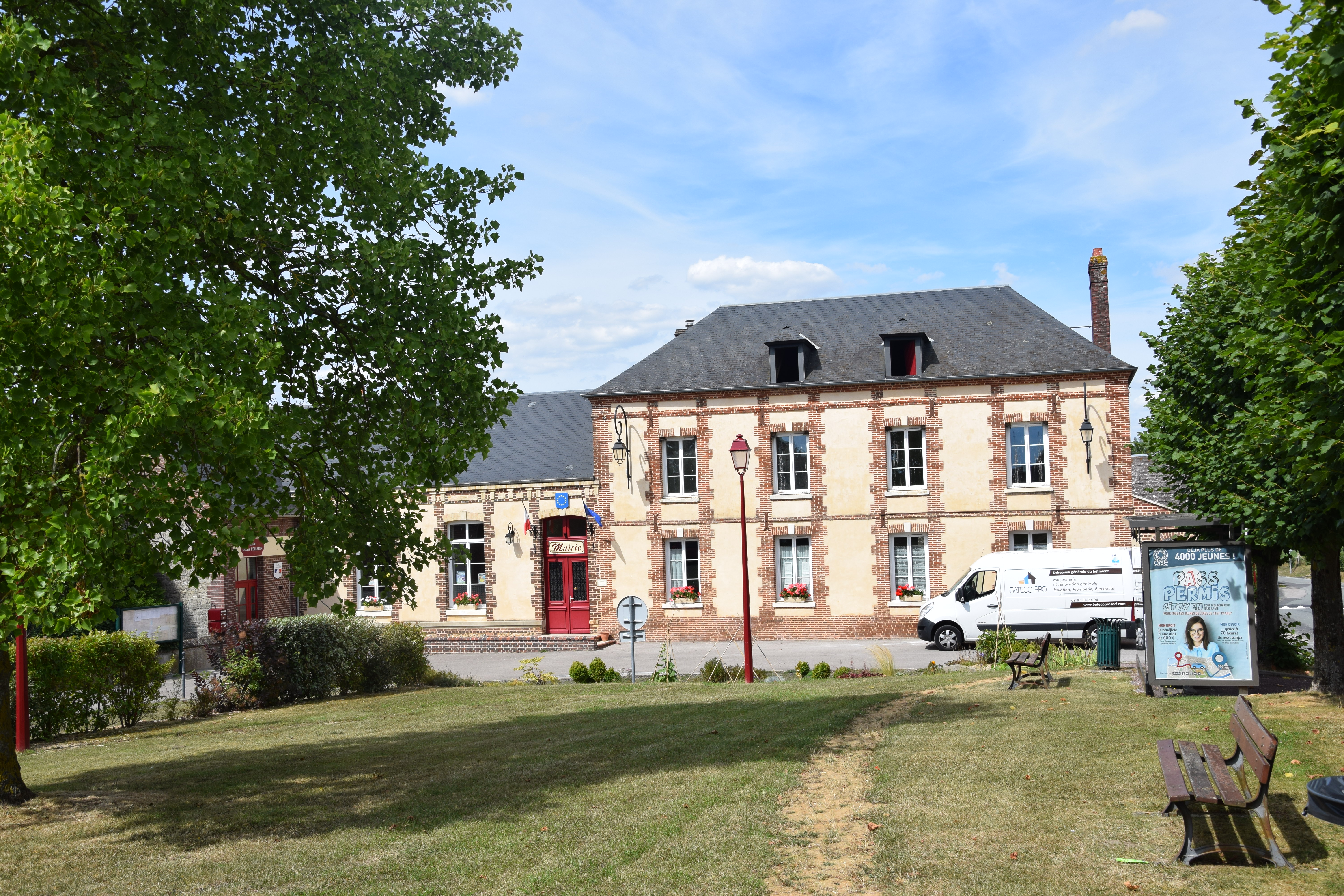 Saint-Pierre-es-Champs